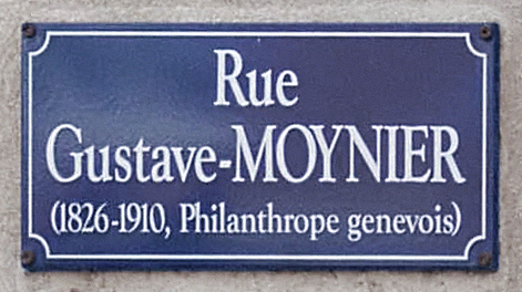 Rue Gustave-Moynier street sign in Geneva